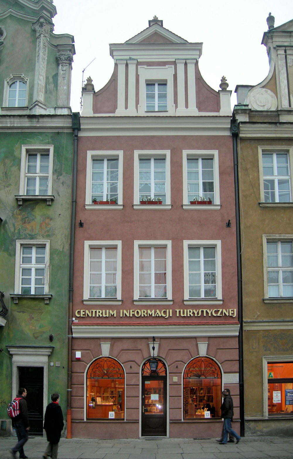 Stary Rynek 59, Poznań, Poland